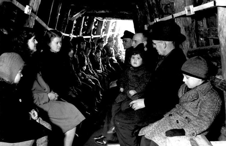 Zentralbild II. Weltkrieg 1939 - 45 Luftschutzstollen im Ruhrgebiet, um 1943. Während eines Fliegeralarms.